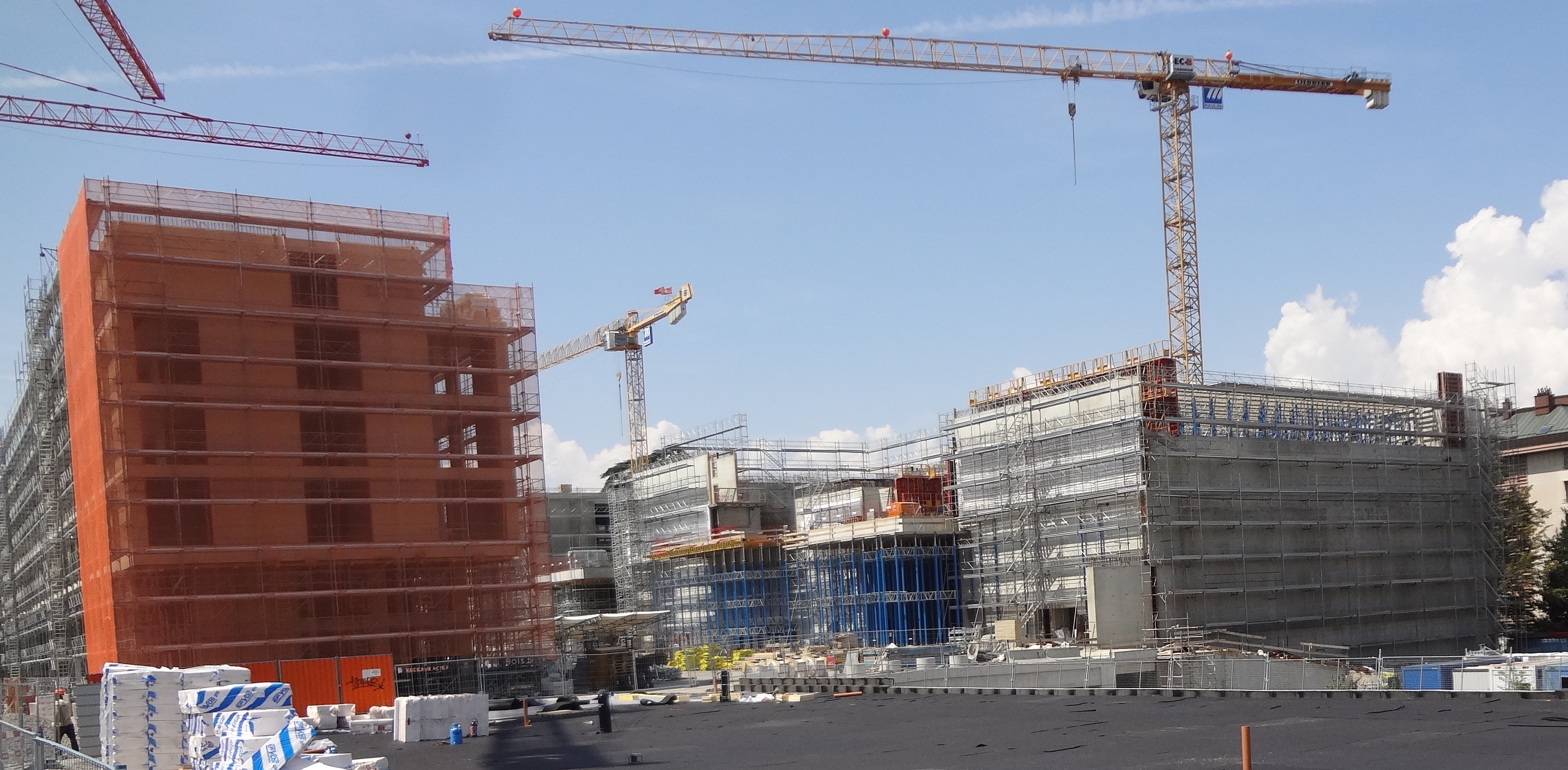 Nouvelles constructions autour de la future gare des Eaux-Vives, dans le cadre du CEVA. Projet O'Vives (logements, bureaux), et Nouvelle Comédie.